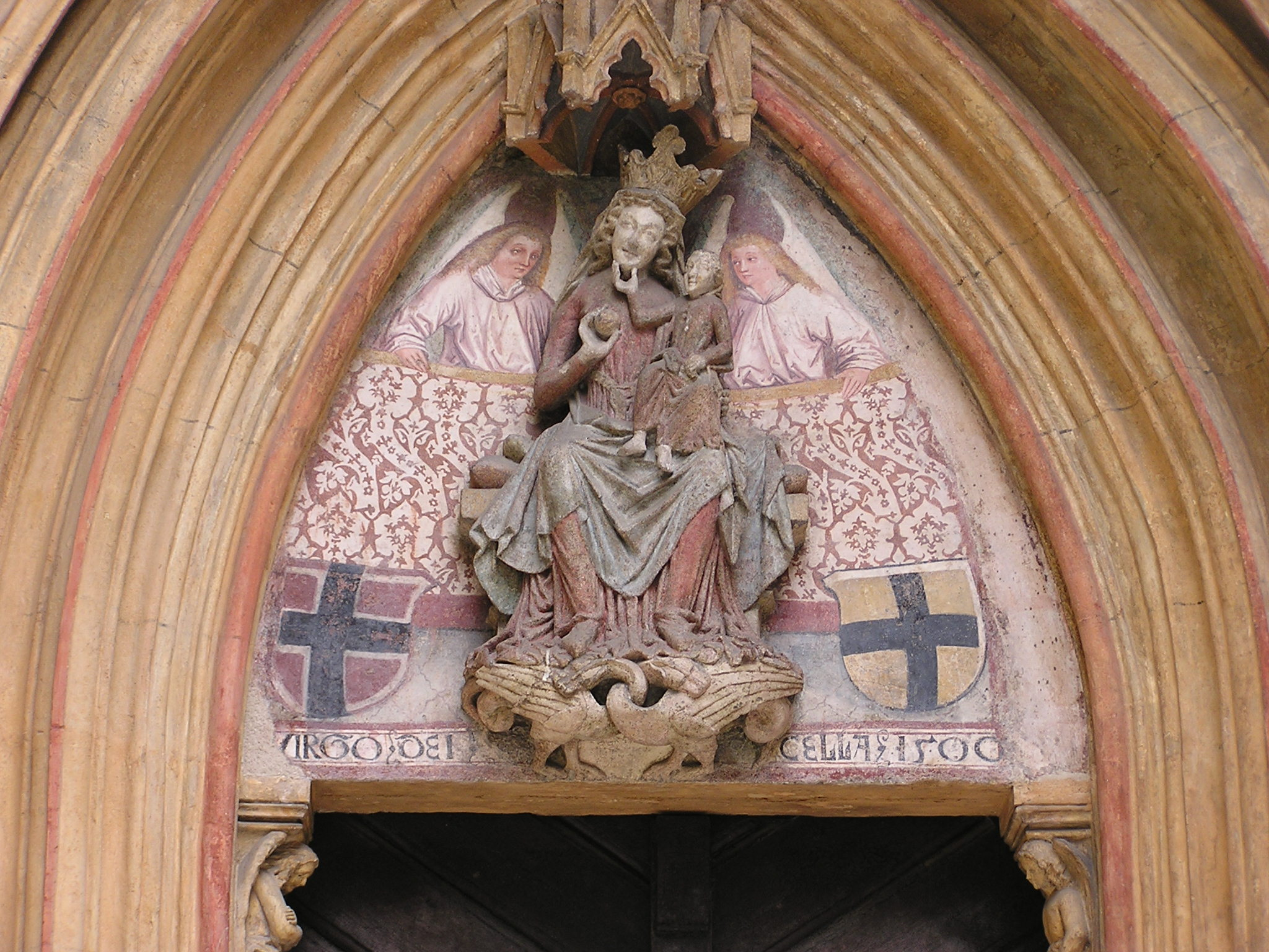 Frühgotische Madonna im Tympanon des Hauptportals der Leechkirche